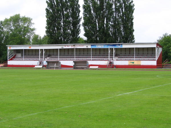 Tribüne des Sportplatz "Kampfbahn" in der Hermann-Allmers-Straße in Cuxhaven